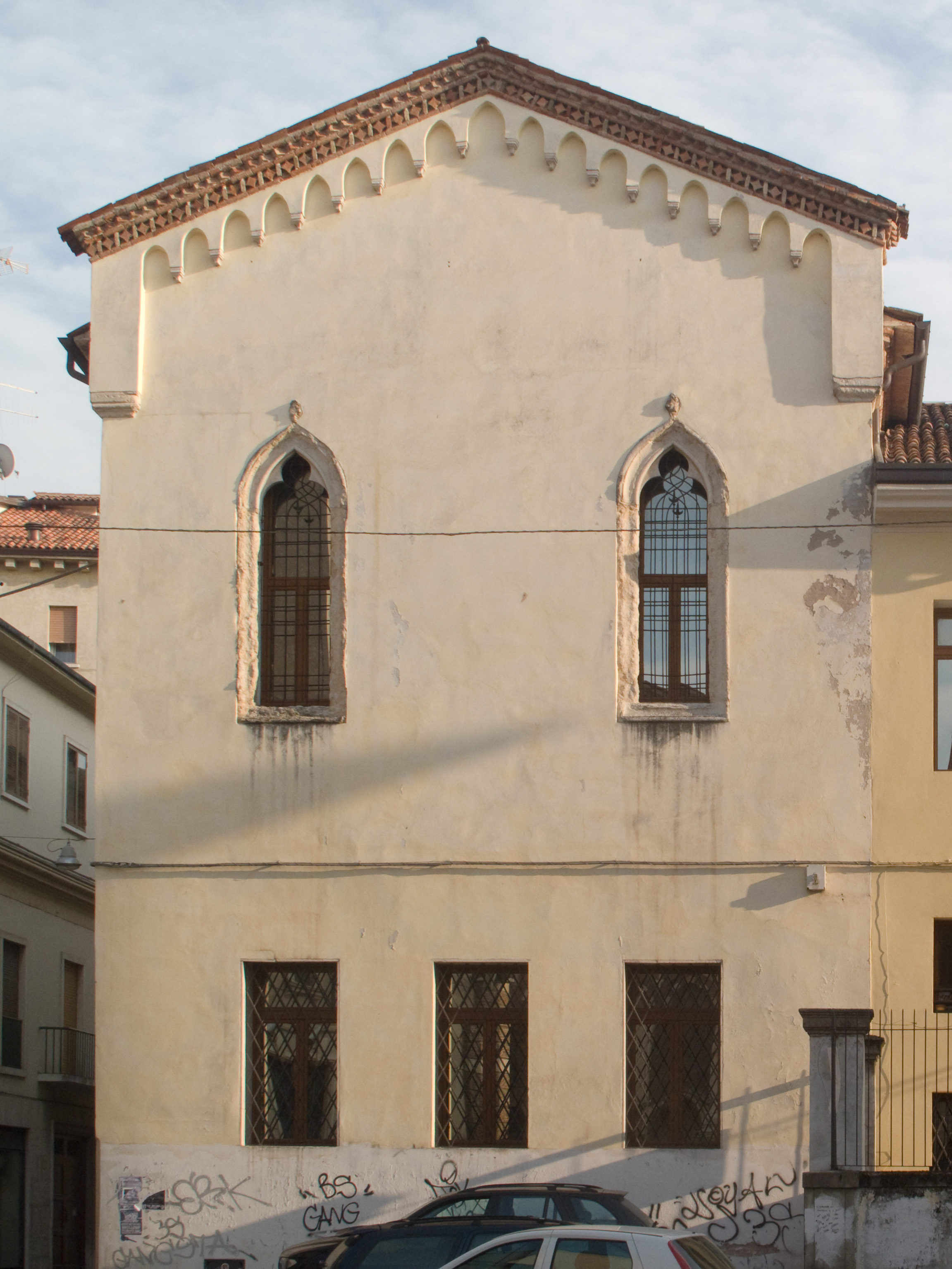 Ospedale di Santa Maria e Cristoforo (San Marcello) - fianco nord